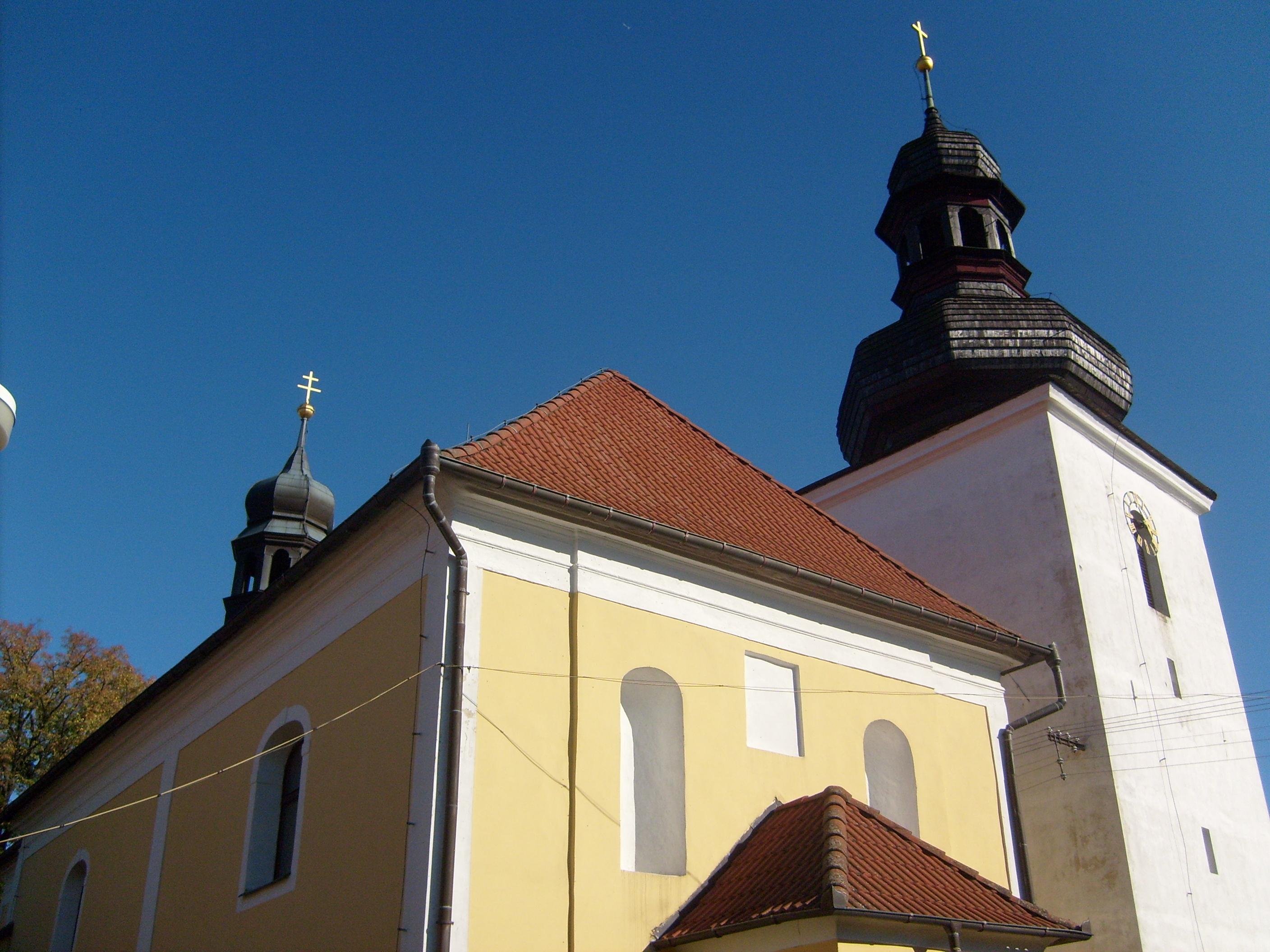 Kostel v Licibořicích, Chrudim District, Pardubice Region, Czech Republic